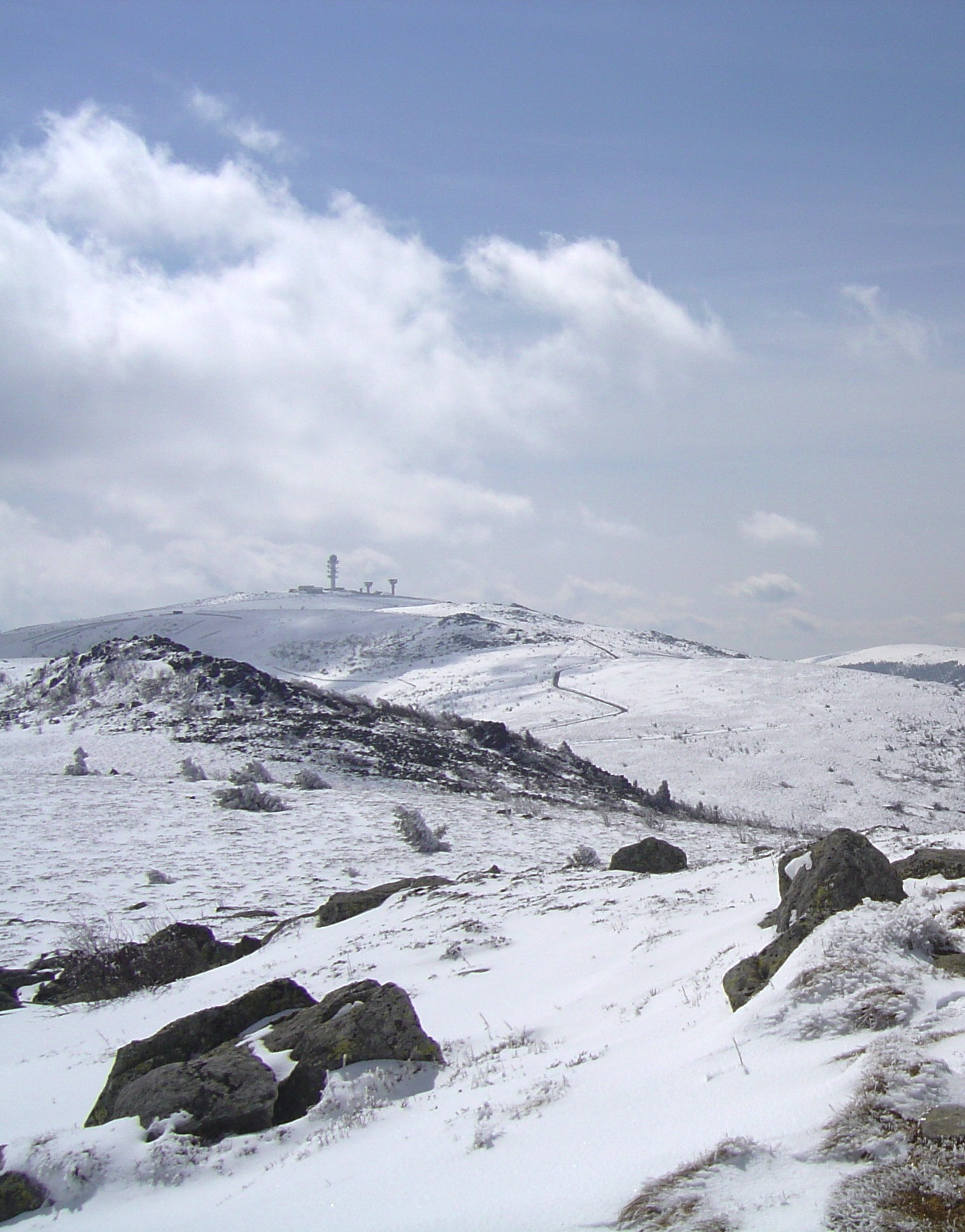 Pierre-sur-Haute depuis le sommet de Peyre-Mayou